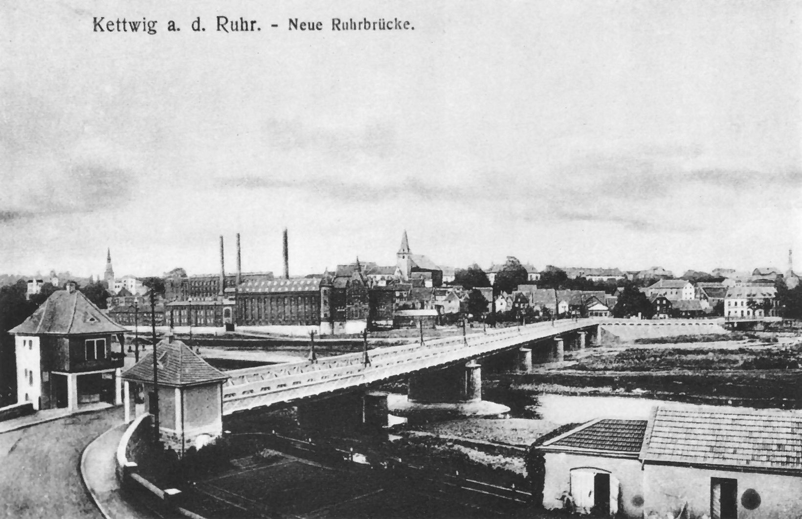 Kettwig um 1912, heute Stadtteil von Essen